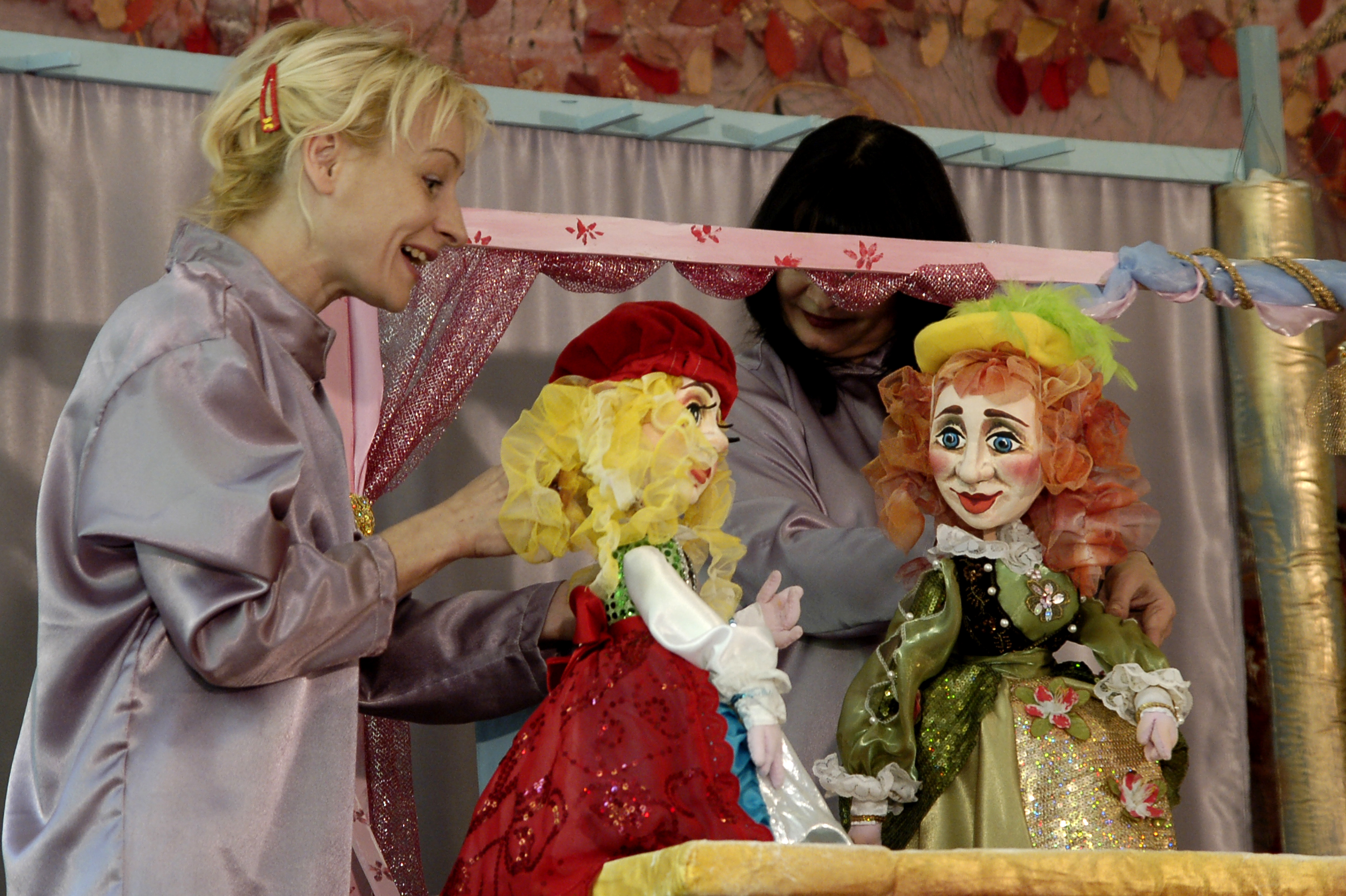 спектакль "Красная Шапочка" в Ростовском государственном театре кукол им. В. С. Былкова